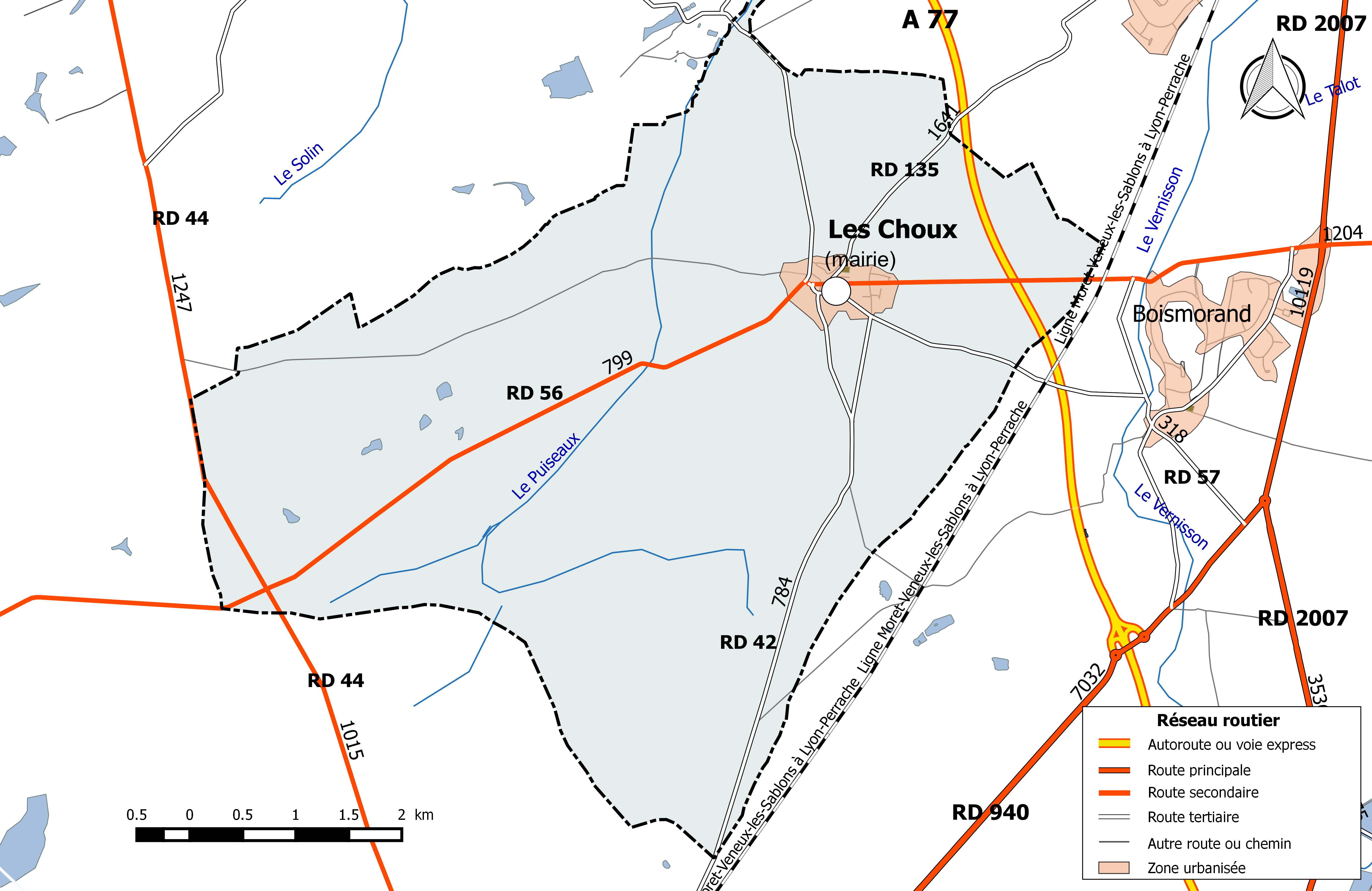 Carte du réseau routier de la commune de Les Choux.